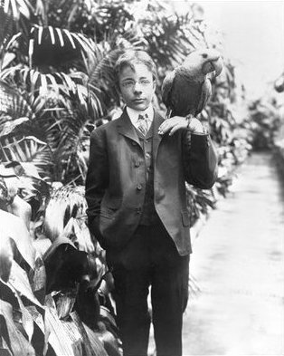 The son of the US president Theodore Roosevelt, Teddy Roosevelt, with the macaw Eli Yale, 1902